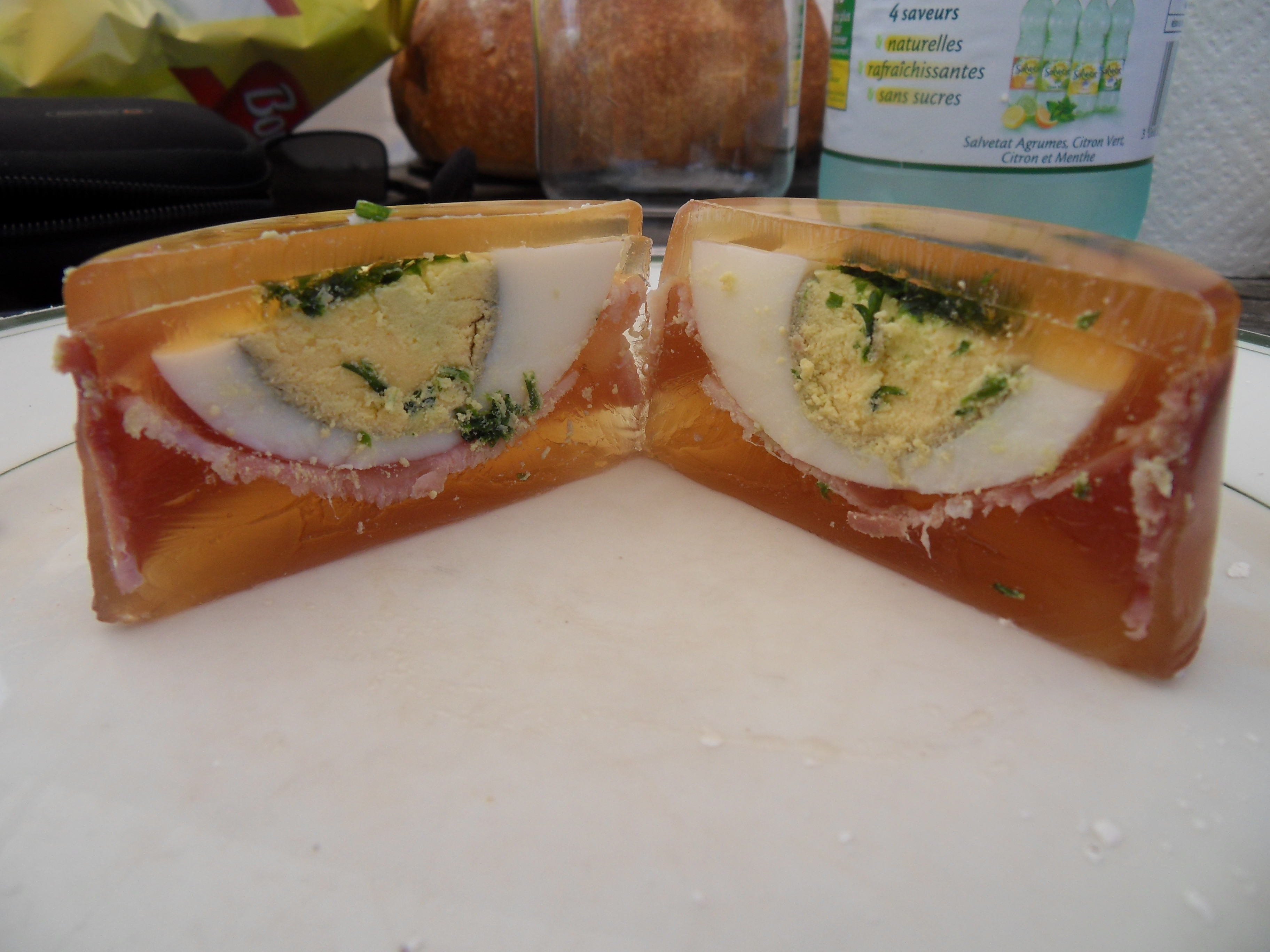 Aspic ouvert